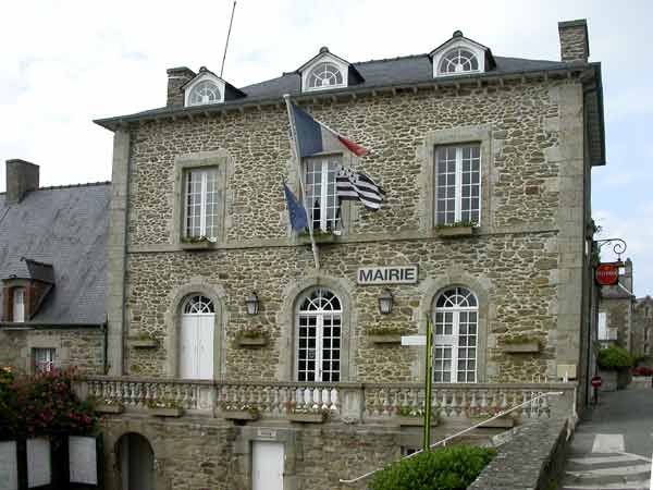 la mairie de Saint Briac